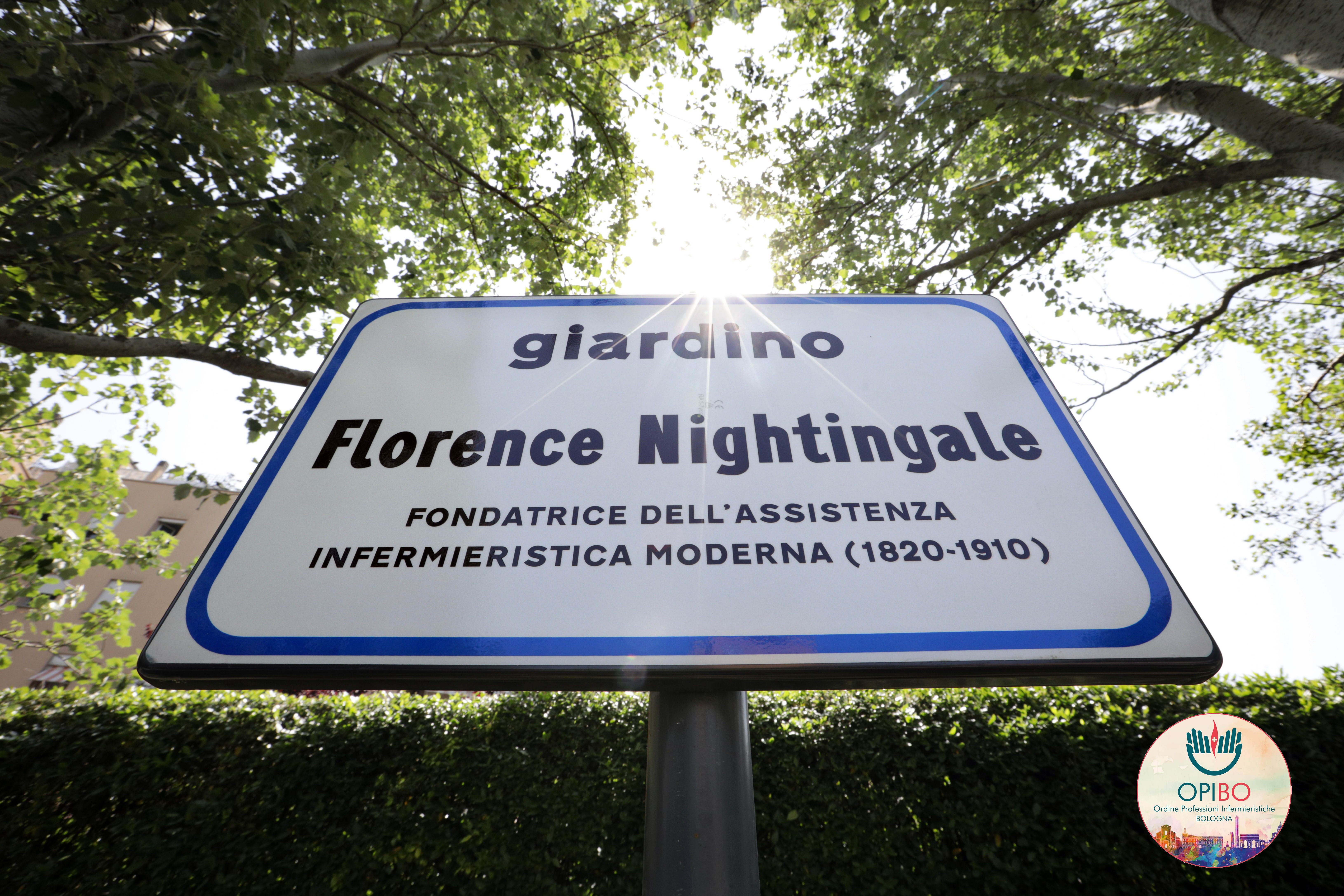 Intitolato a Florence Nightingale – fondatrice dell’assistenza infermieristica moderna – il giardino pubblico di via delle Armi a Bologna.